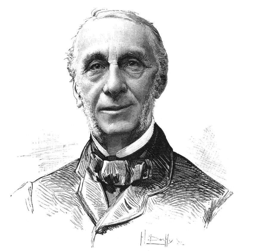 "M. Schérer, sénateur, mort à Paris le 16 mars".